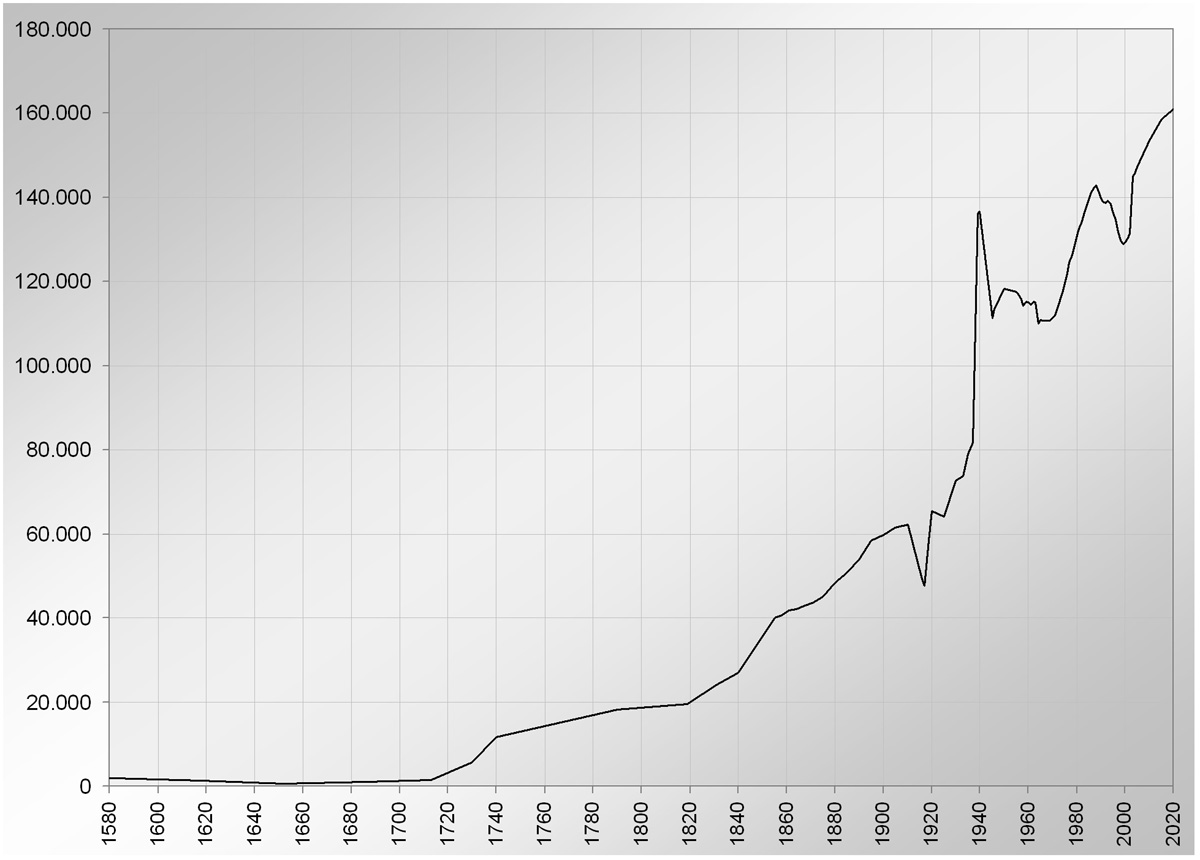 Einwohnerentwicklung von Potsdam 1580-2005, 2006-2020 Prognose der Bertelsmann Stiftung (population of Potsdam, Germany)